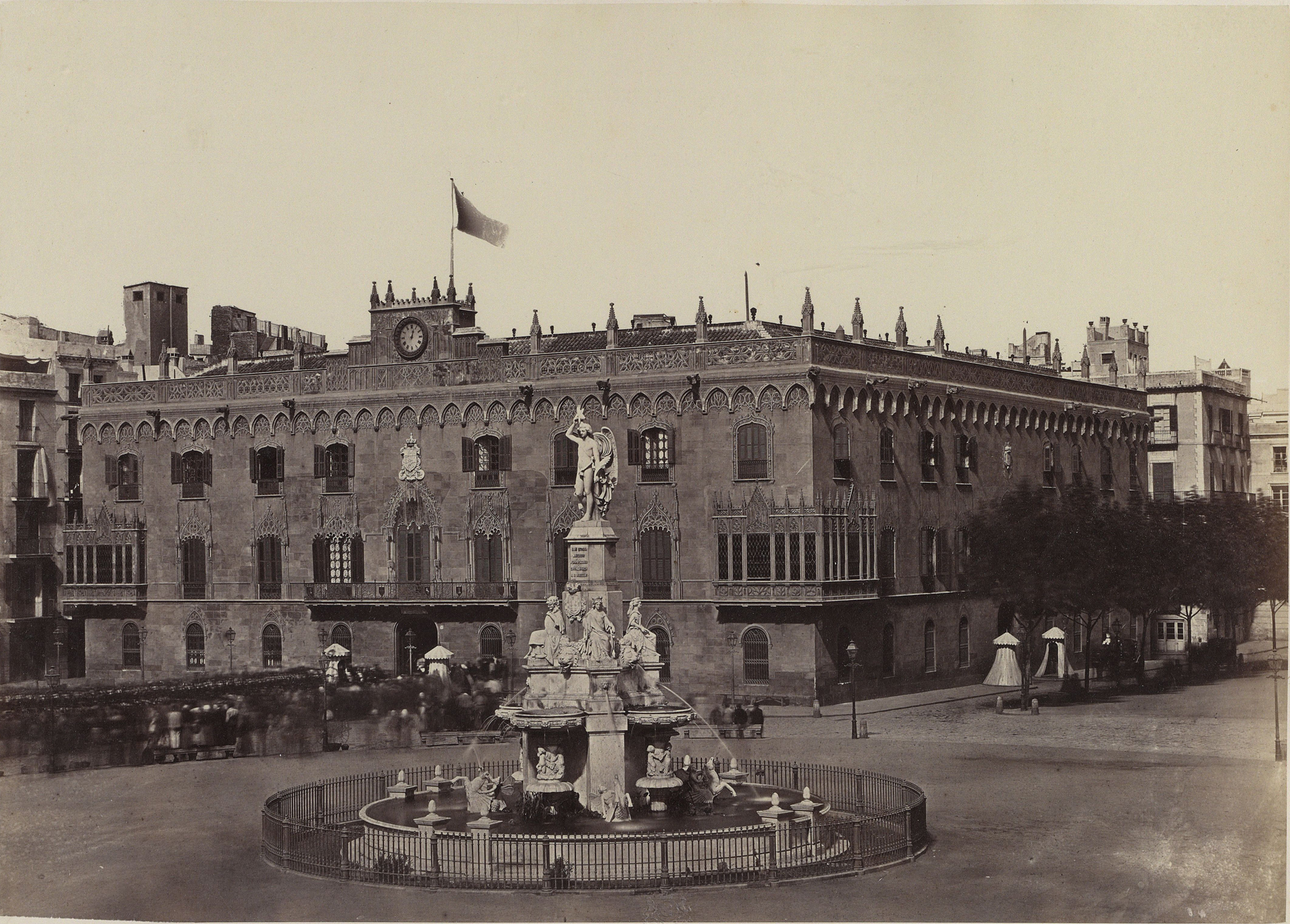 "Palacio de la Reina de Barcelona, 1860"